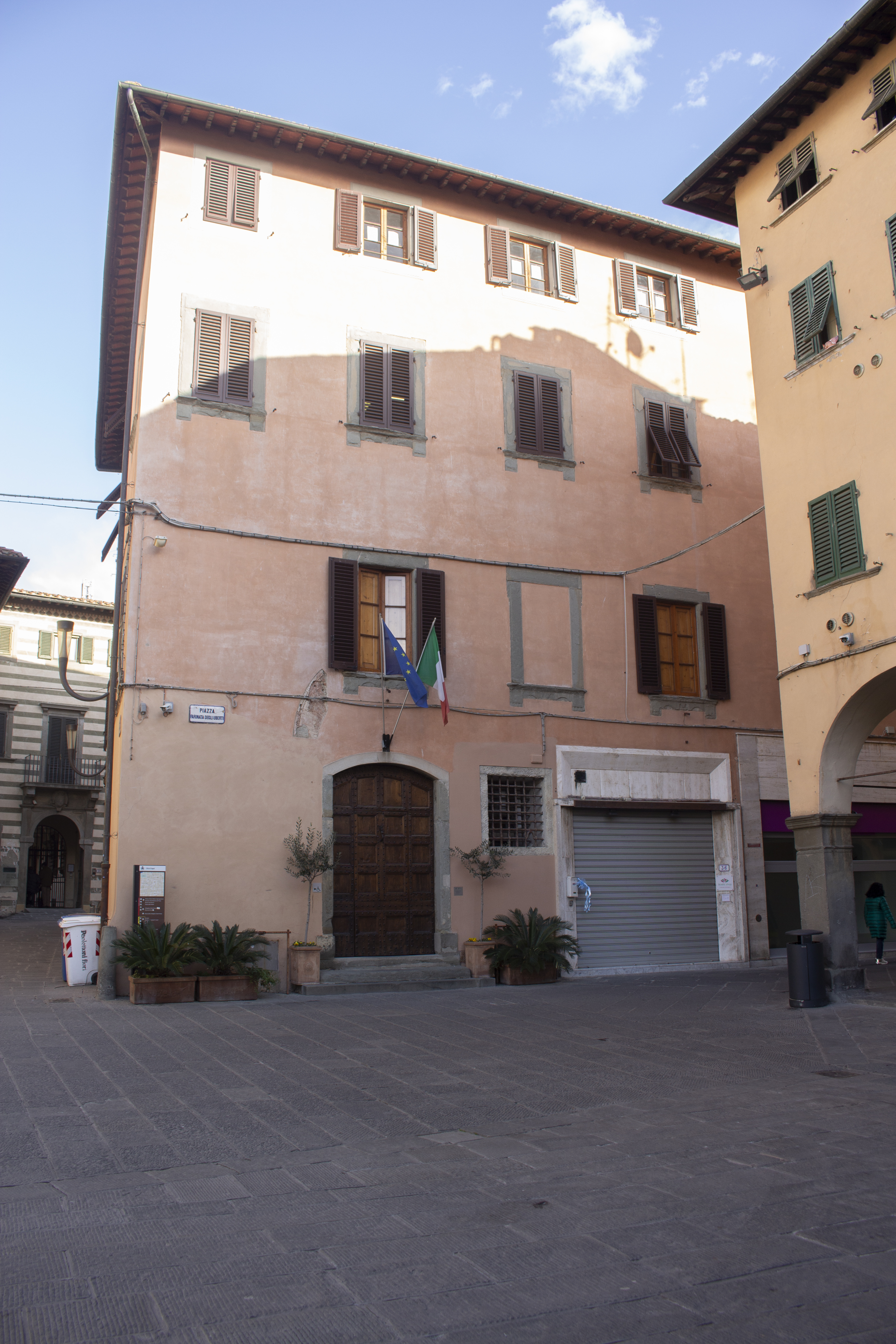 Facciata e angolo di Palazzo Pretorio in Piazza Farinata degli Uberti a Empoli